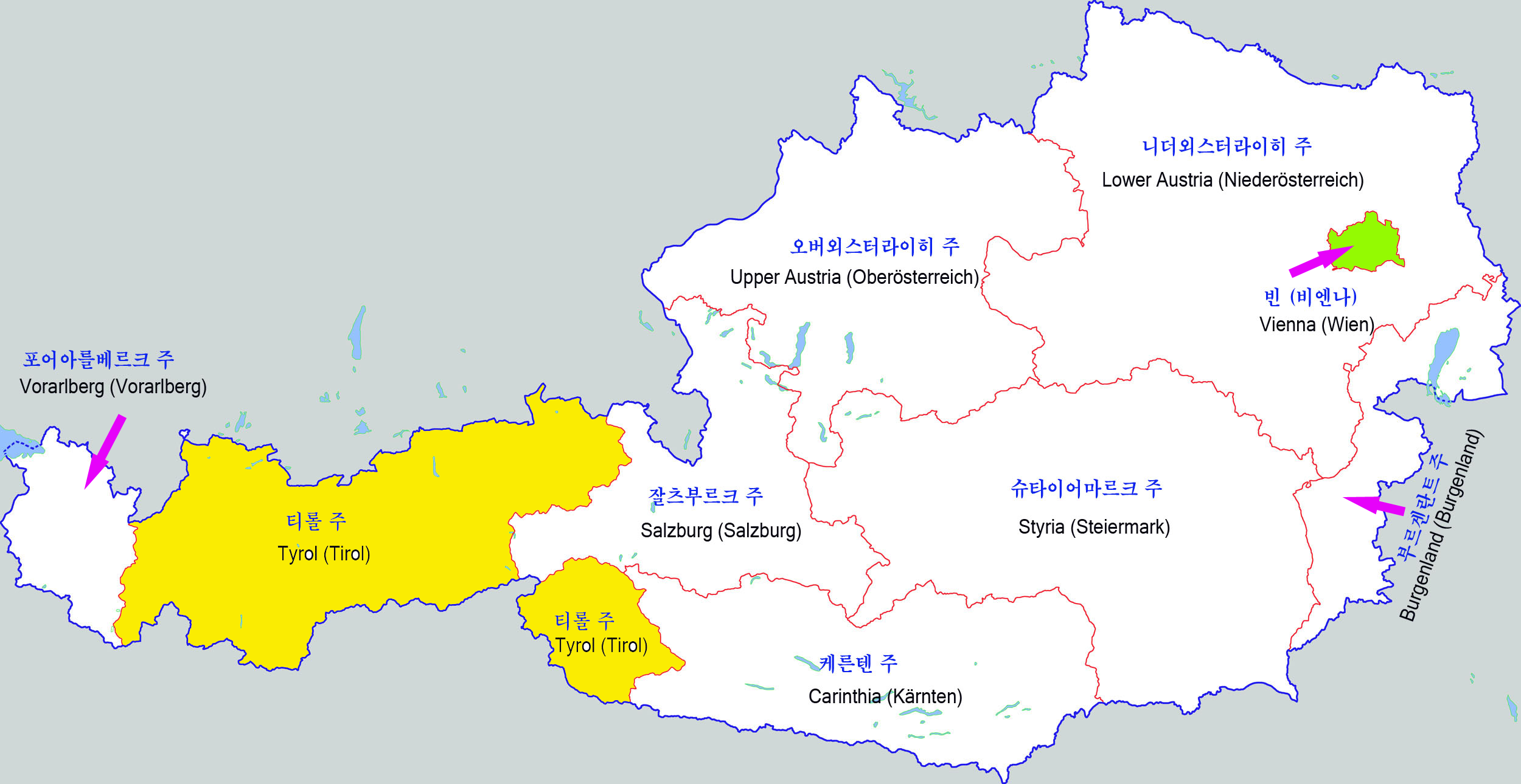 오스트리아 행정구역